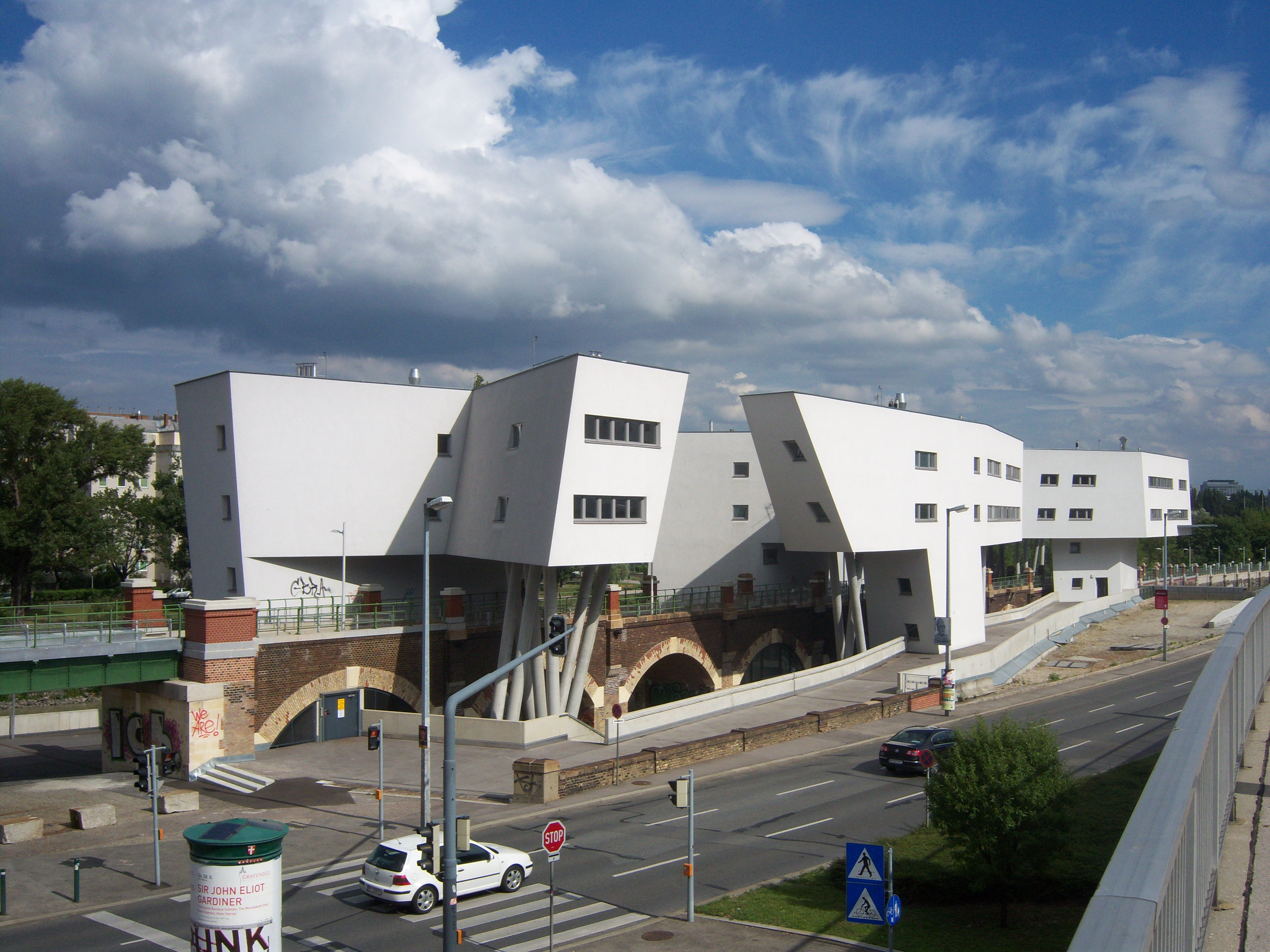 Der ehemalige Stadtbahn-Verbindungsbogen zwischen Gürtel und Friedensbrücke wurde überbaut